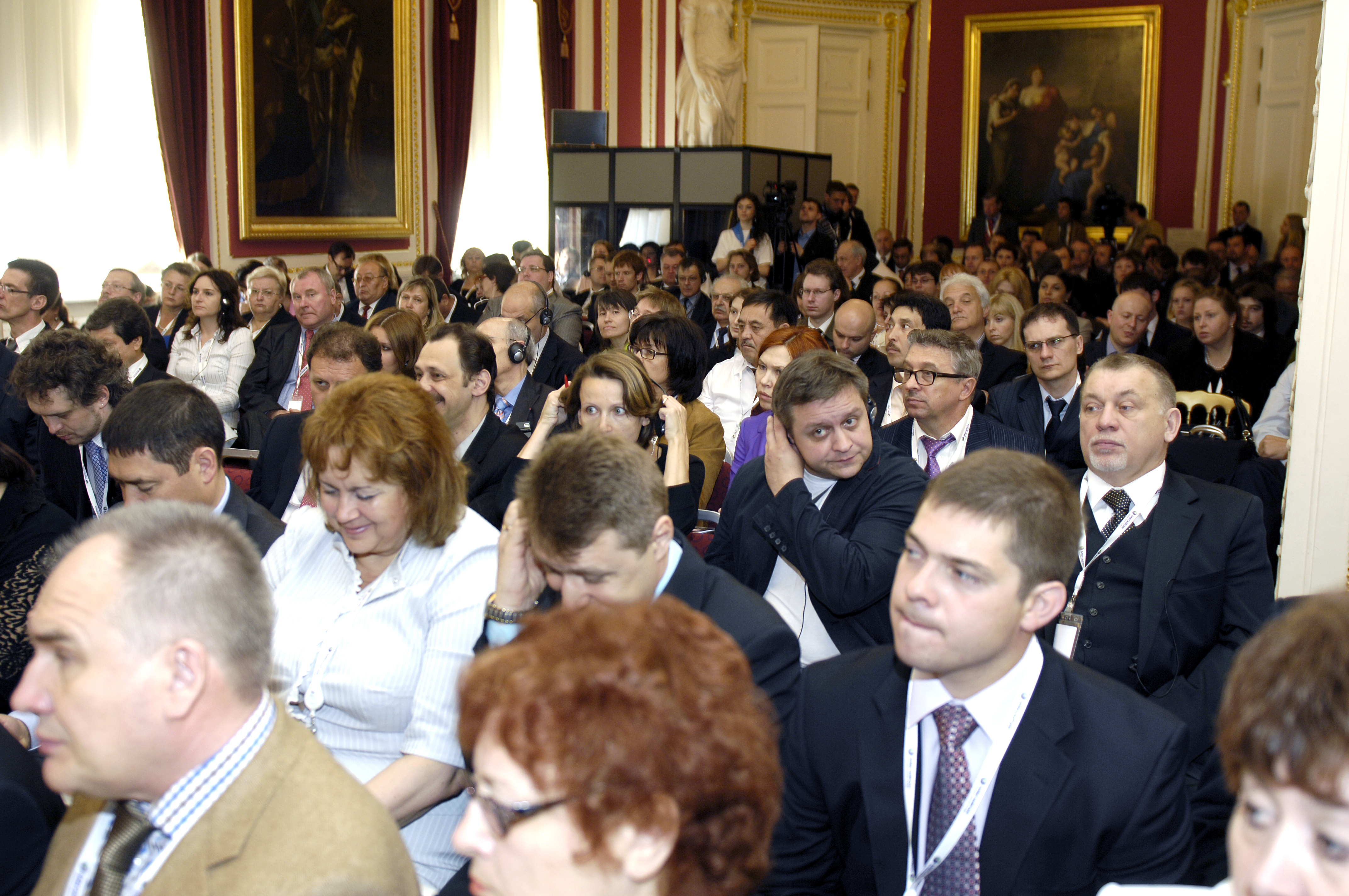 discussion session, spilf